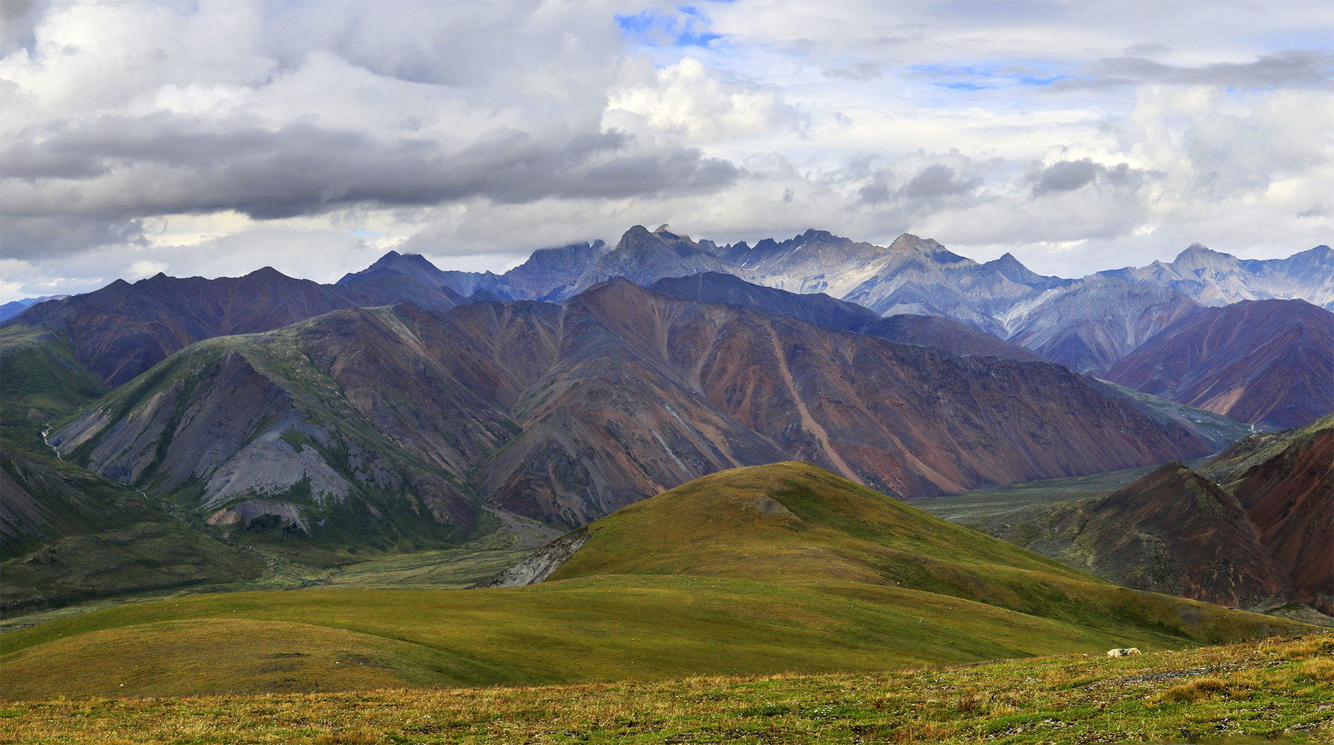 Момский: Расположен в восточной части Момо-Селенняхской впадины и охватывает собой территорию верхней части бассейна реки Момы, включая Буордахский горный массив с пиком г. Победа (3 003 м), Момский район, Якутия (Саха) This image is related to the protected area of Russia number 1410127